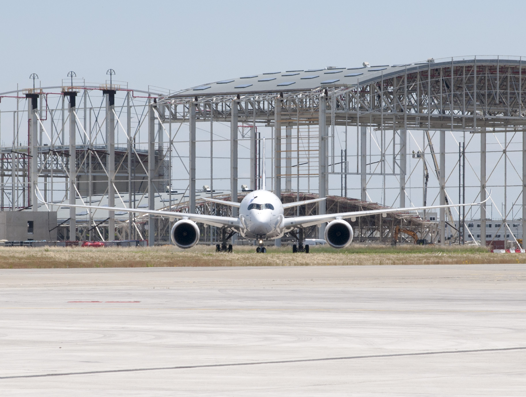 Roulage du premier exemplaire de l'A350, juste après son premier vol, sur le site Airbus de Toulouse